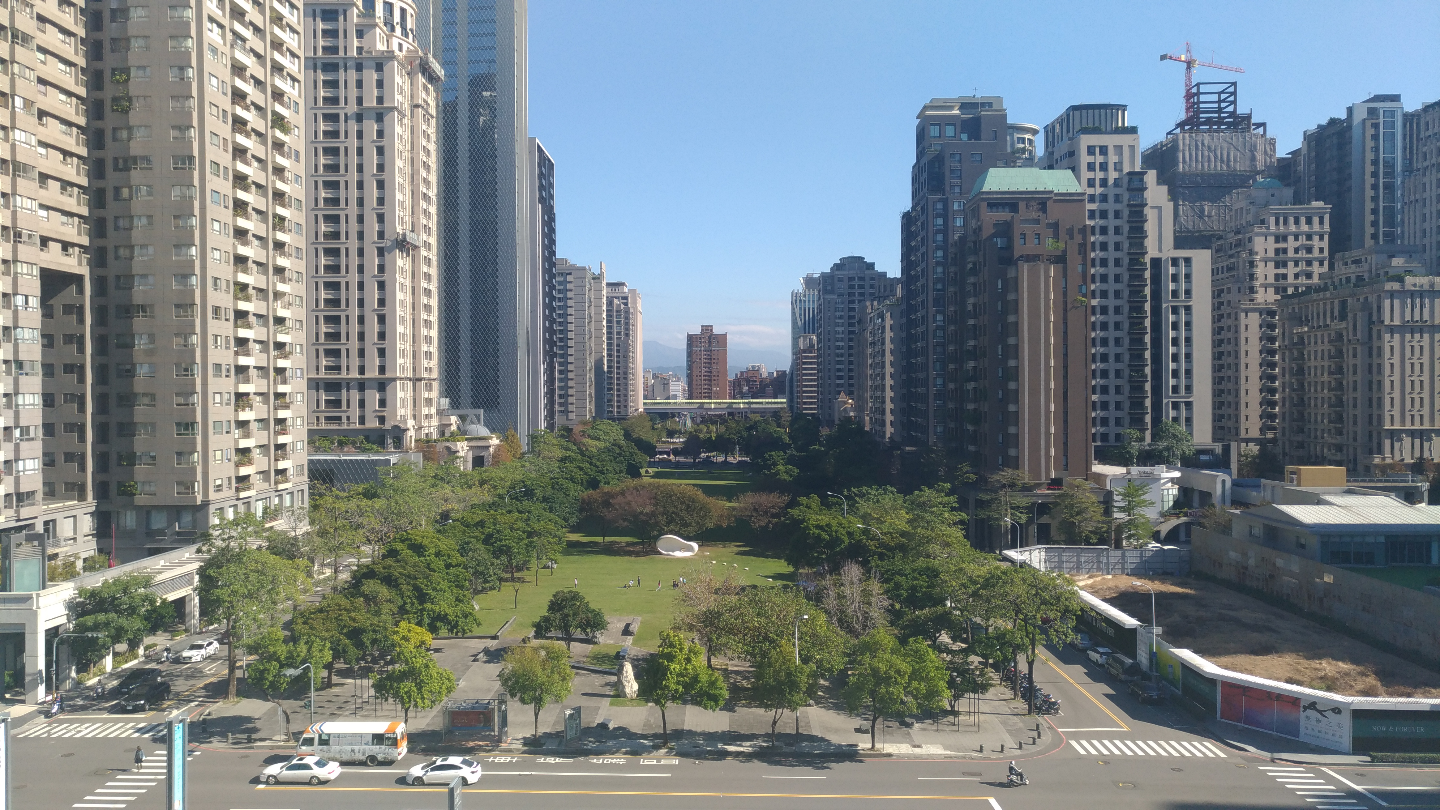 臺中夏綠地公園